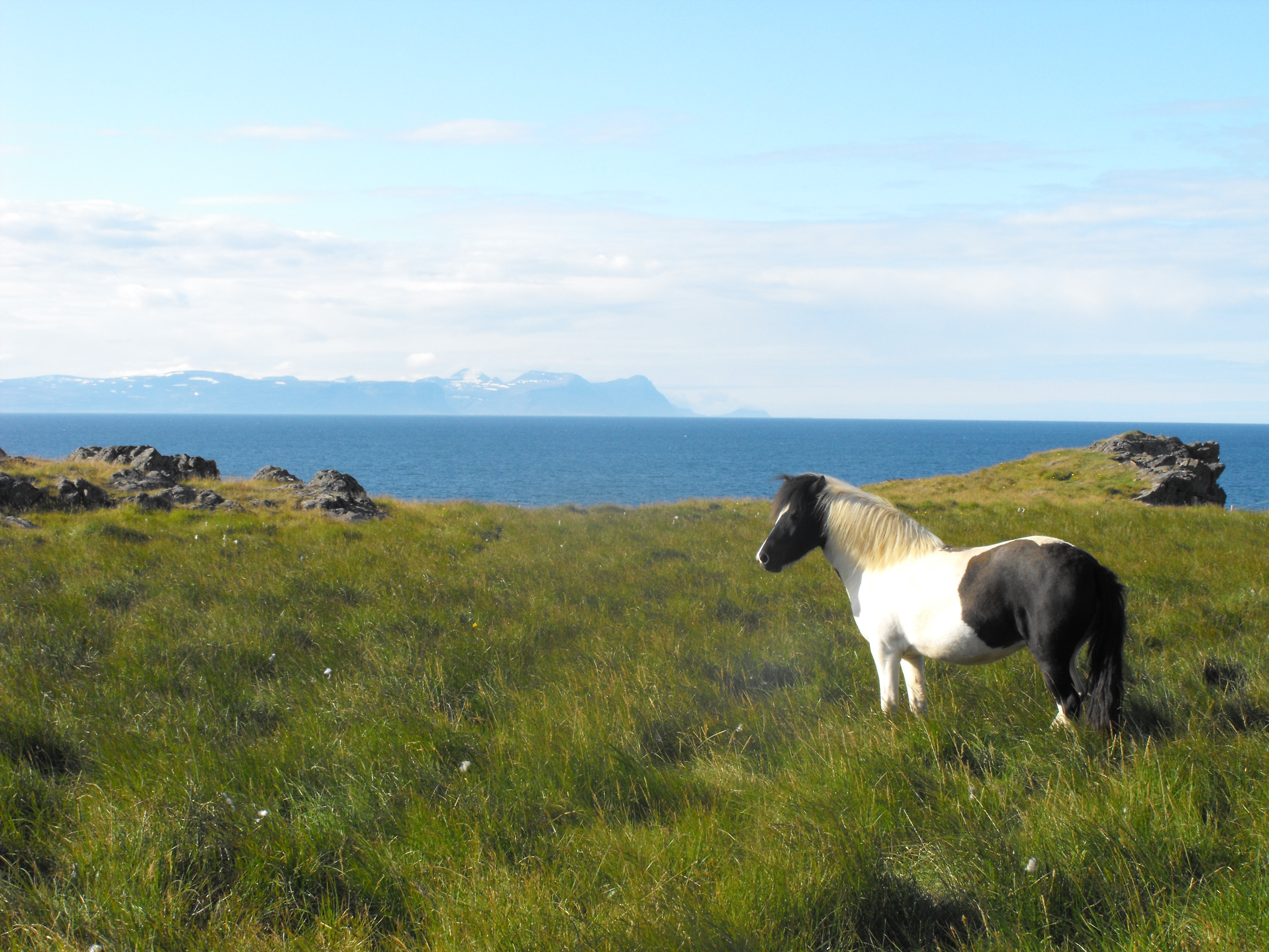 アイスランド・フーナ湾沿いの草原に佇むアイスランド種の馬。9-10世紀頃から伝わる同国原産の馬である。2009年6月下旬、同国北部のヴェストゥル・フーナヴァスシスラ県を周回する711号線道路から撮影。